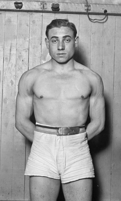 Challenge Marcel Paris 1923, [Charles] Rigoulot, 3e, mi-lourds [haltérophilie] : [photographie de presse] / [Agence Rol]